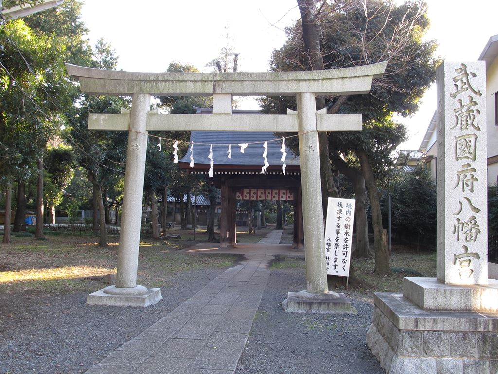 武蔵国府八幡宮・八幡神社。東京都府中市八幡町。二の鳥居